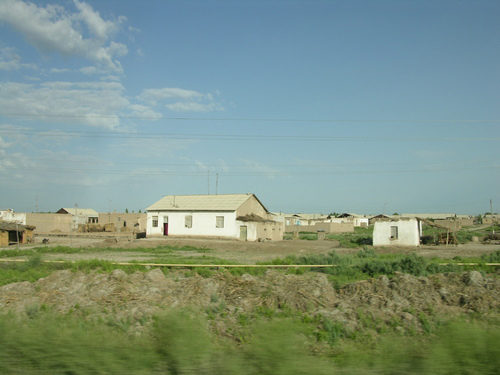 Дома Шурахана